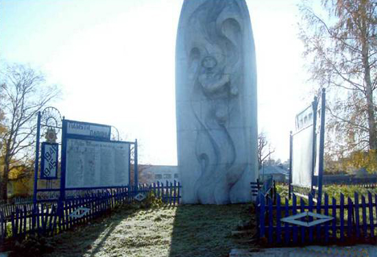 Староиликово (башк. Иҫке Илек) — село в Благовещенском районе Башкортостана.